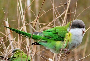 Psilopsiagon aymara Periquitos que vi en Capilla del Monte